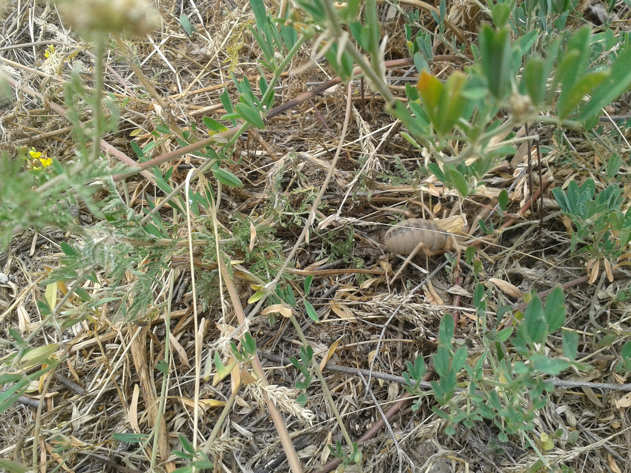 Сольпуга обыкновенная, 5 июля 2014 года